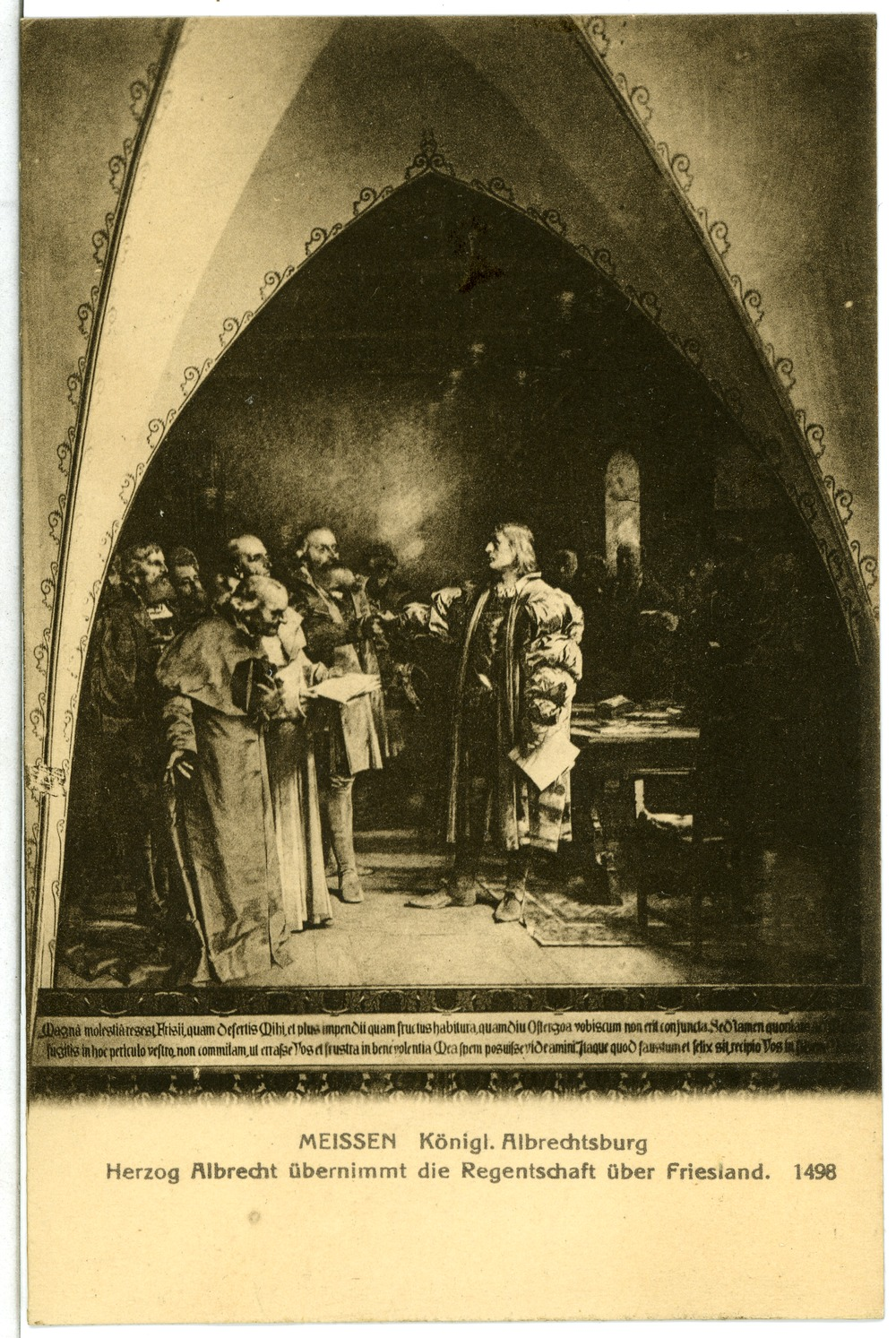 Eine Gesandtschaft der Schieringer bittet Herzog Albrecht den Beherzten im März 1498 in Medemblik um Hilfe und trägt ihm die Statthalterschaft in Friesland an. Historienmalerei in der Albrechtsburg in Meißen von Julius Scholtz (1877).[1] This postcard is from publisher Brück & Sohn in Meißen ( postcard has a unique number 11786 and is available in a higher resolution at the publisher. This images was uploaded in a cooperation project between Wikipedians and the publisher.